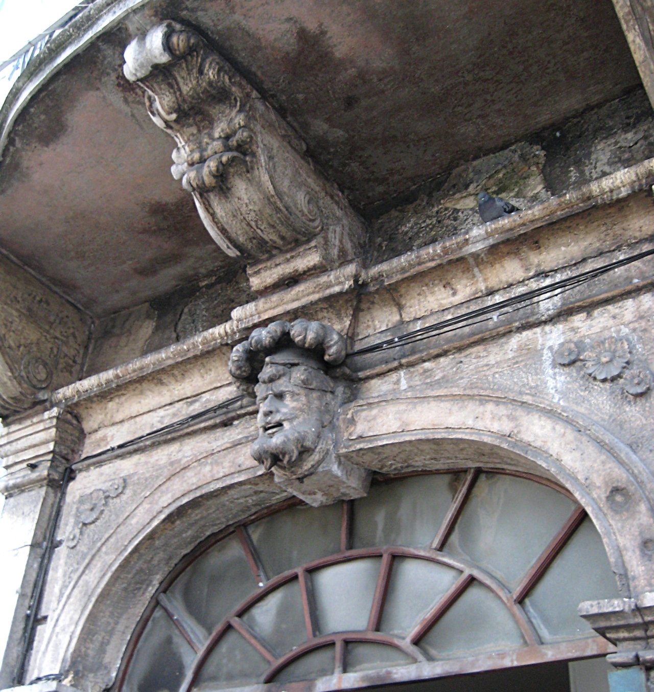 Ulaz u palaču Adamić s Fiumare